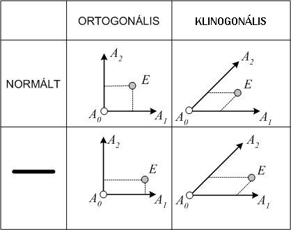 Koordináta-rendszer változatok